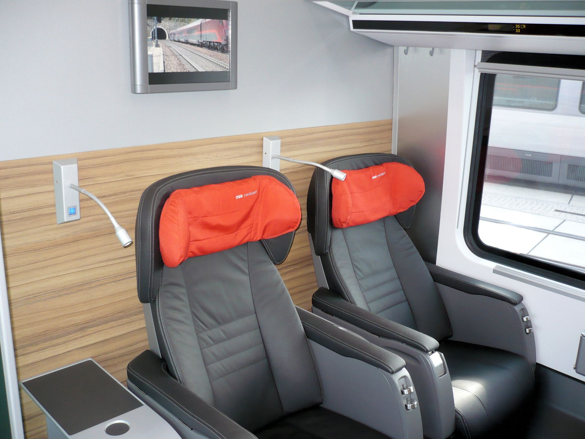 Premiumklasse im Railjet der ÖBB